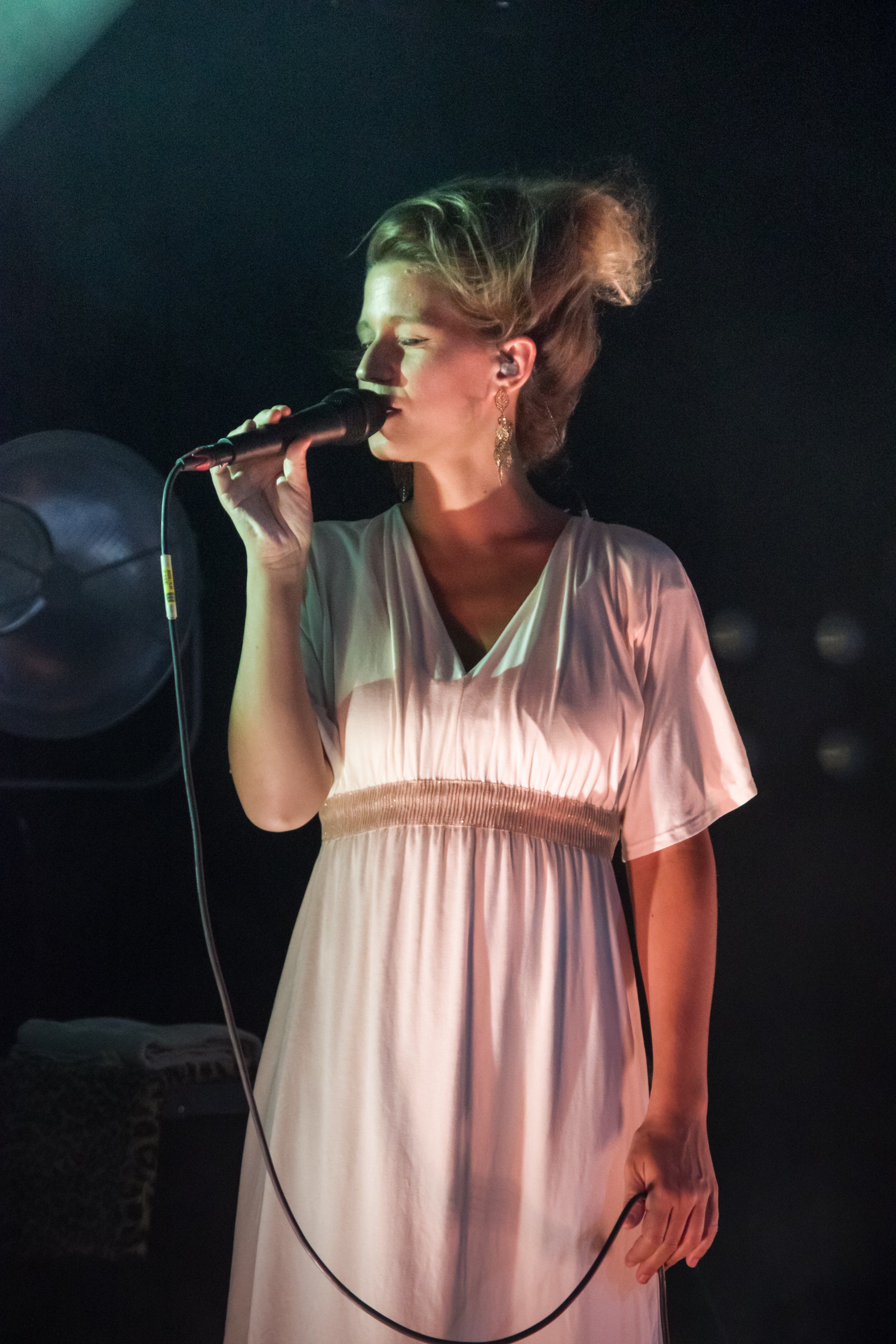 Das Zelt-Musik-Festival 2018 in Freiburg im Breisgau 26.07.2018 Selah Sue